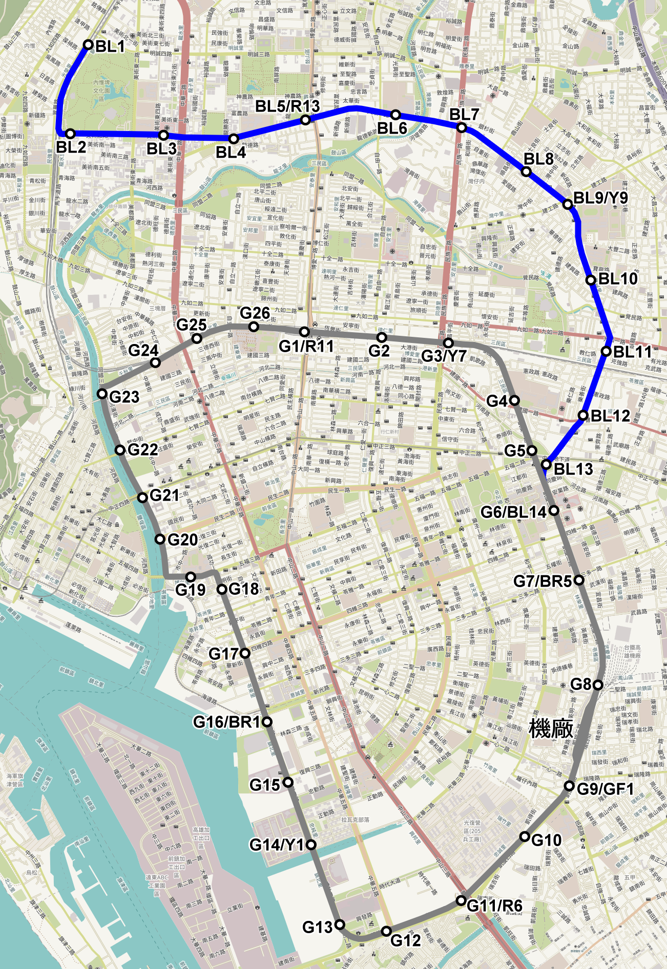 臨港輕軌與輕軌藍線合併前的版本